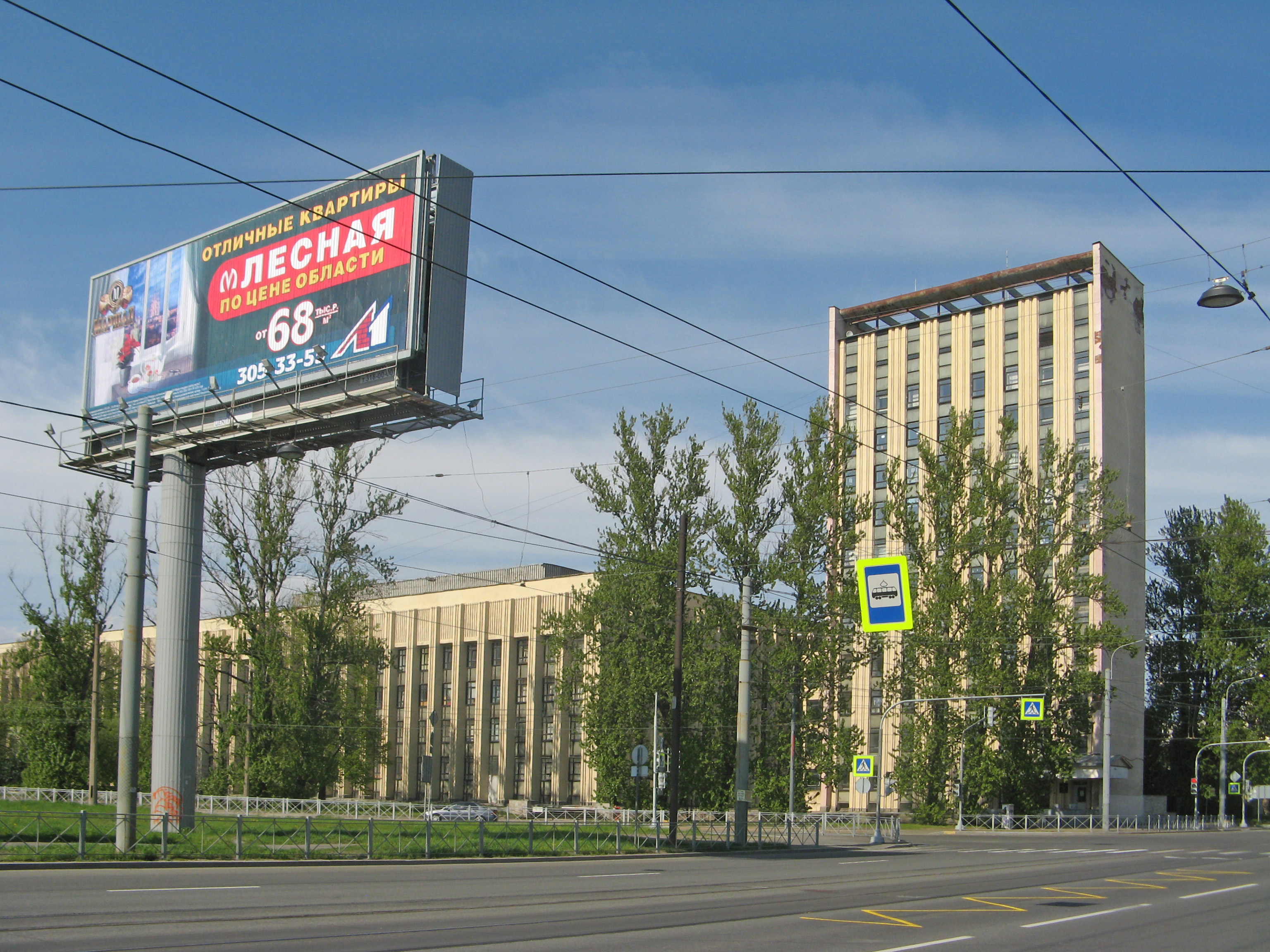 Новоросскийская улица в Санкт-Петербурге